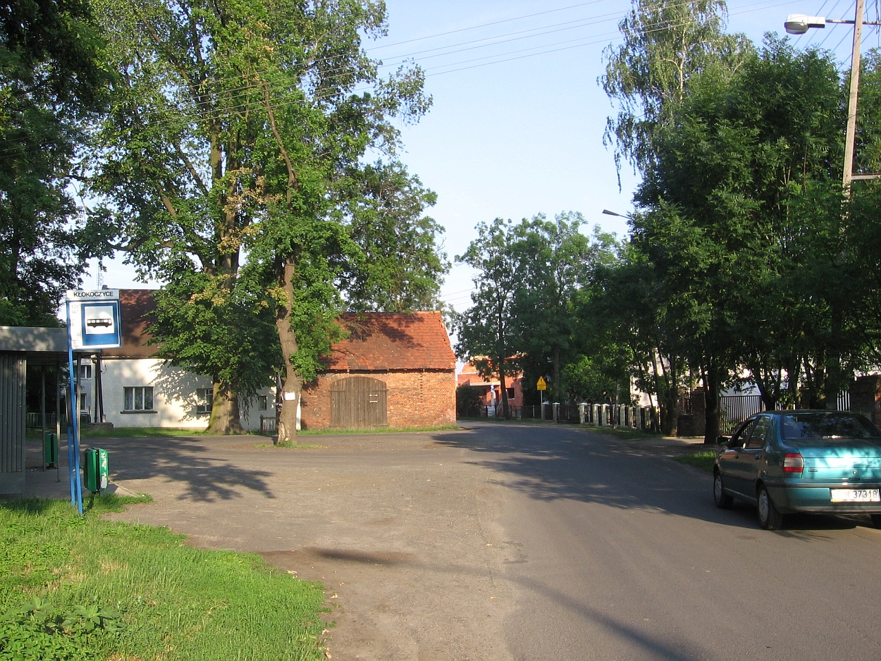 Kłokoczyce settlement - Wrocław, Poland